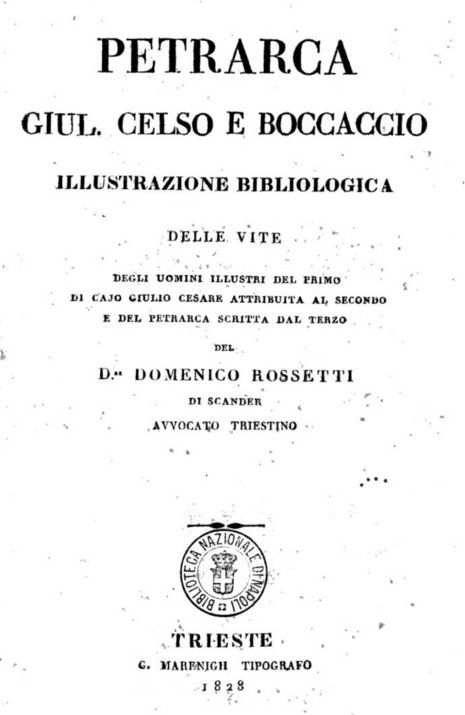 Frontespizio del libro Petrarca etc. di Domenico Rossetti De Scander (XiX secolo) tratto da Internet Archive